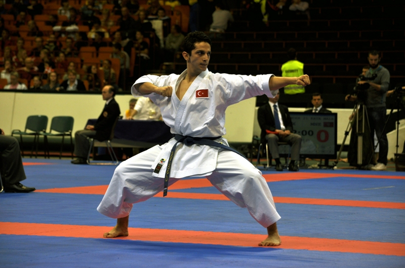 Metin Sofuoğlu Jion